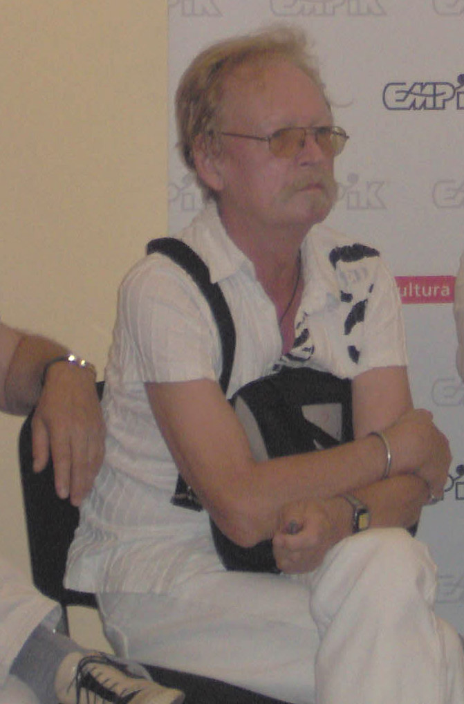 Jerzy Kossela